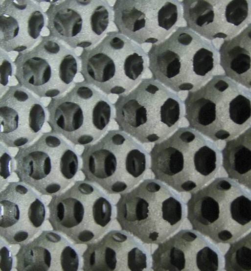 Mousses aluminium CTIF, pores Ø14mm